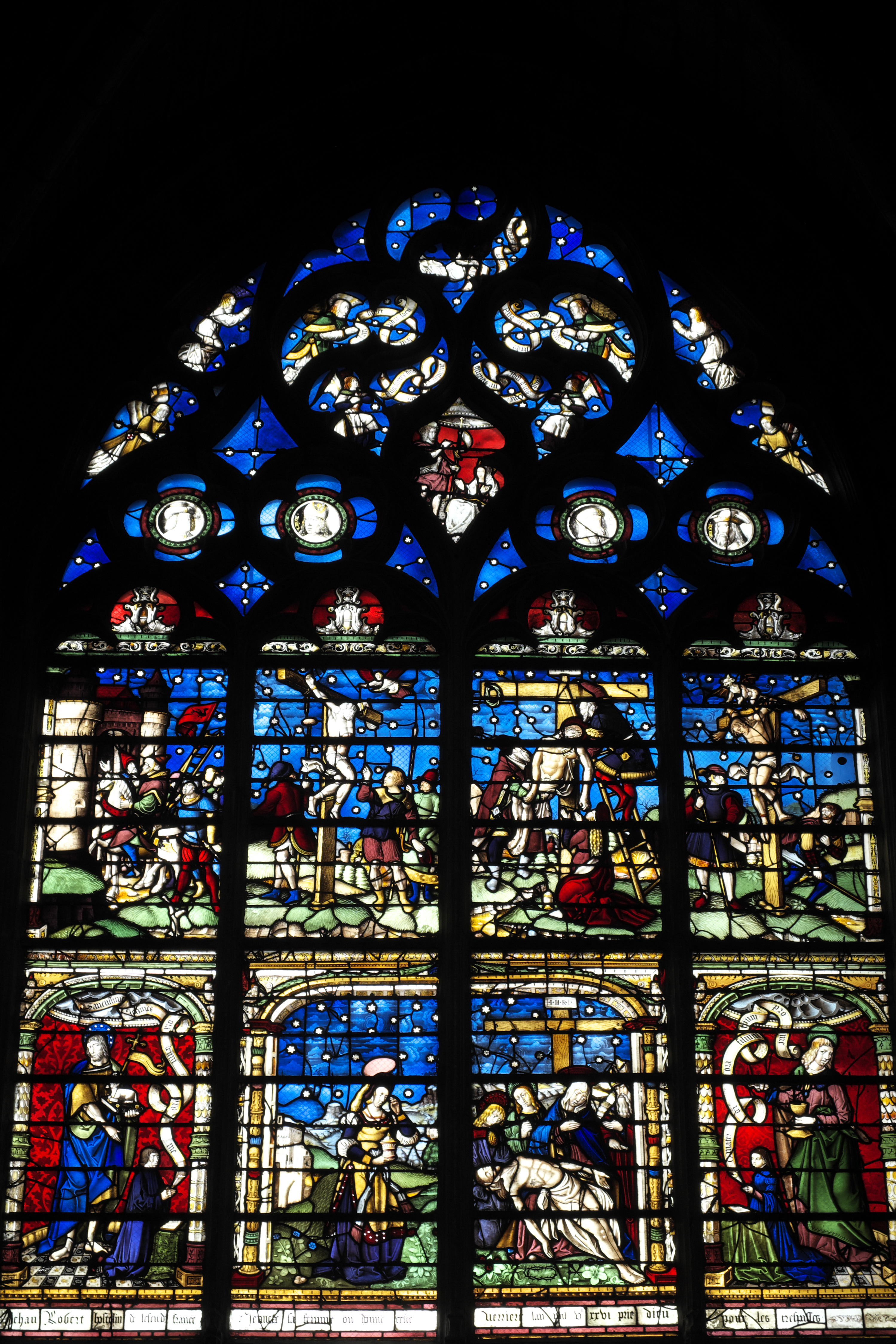 Bleiglasfenster (Baie 19) in der Stiftskirche Notre-Dame-en-Vaux in Châlons-en-Champagne im Département Marne (Champagne-Ardenne/Frankreich), 1526 gestiftet; Darstellung: Kreuzabnahme (oben), Beweinung Jesu (unten)